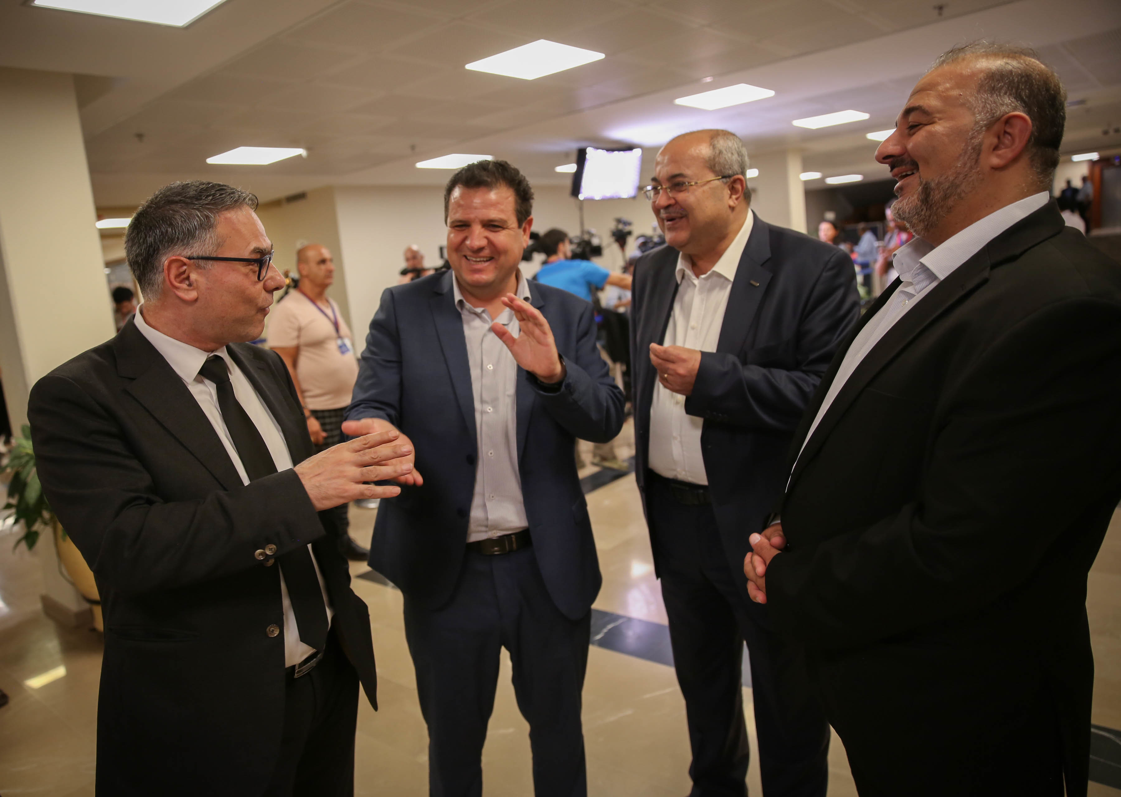 חברי הכנסת מהרשימה המשותפת בזמן הגשת הרשימות לבחירות לכנסת ה 22